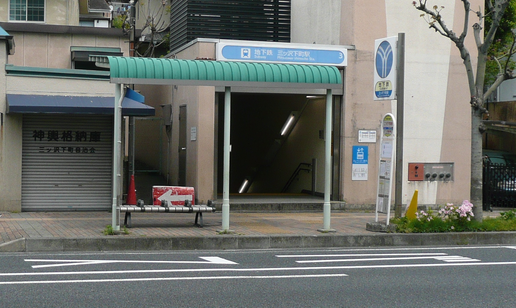 三ツ沢下町駅3番出入口